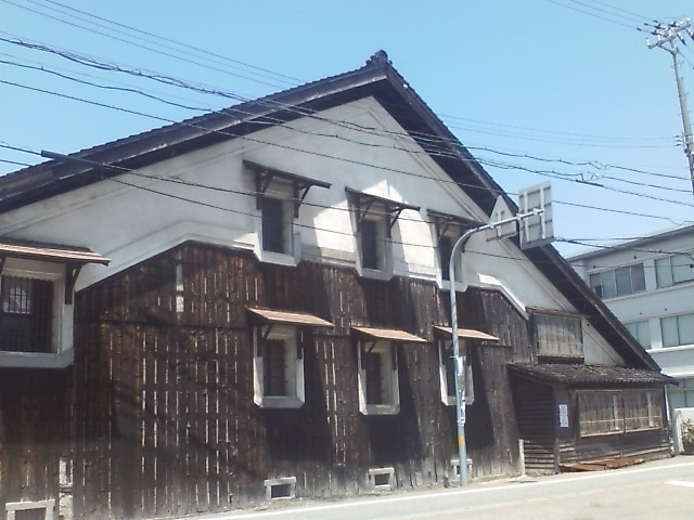 若鶴酒造本社の象徴・大正蔵。砺波市ふるさと文化財にも指定されている。